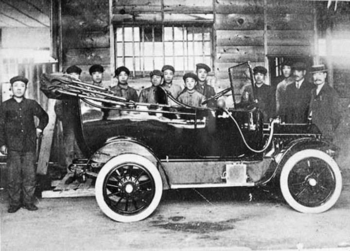 DAT-GO - первый автомобиль Datsun, выпущенный в 1914 году.